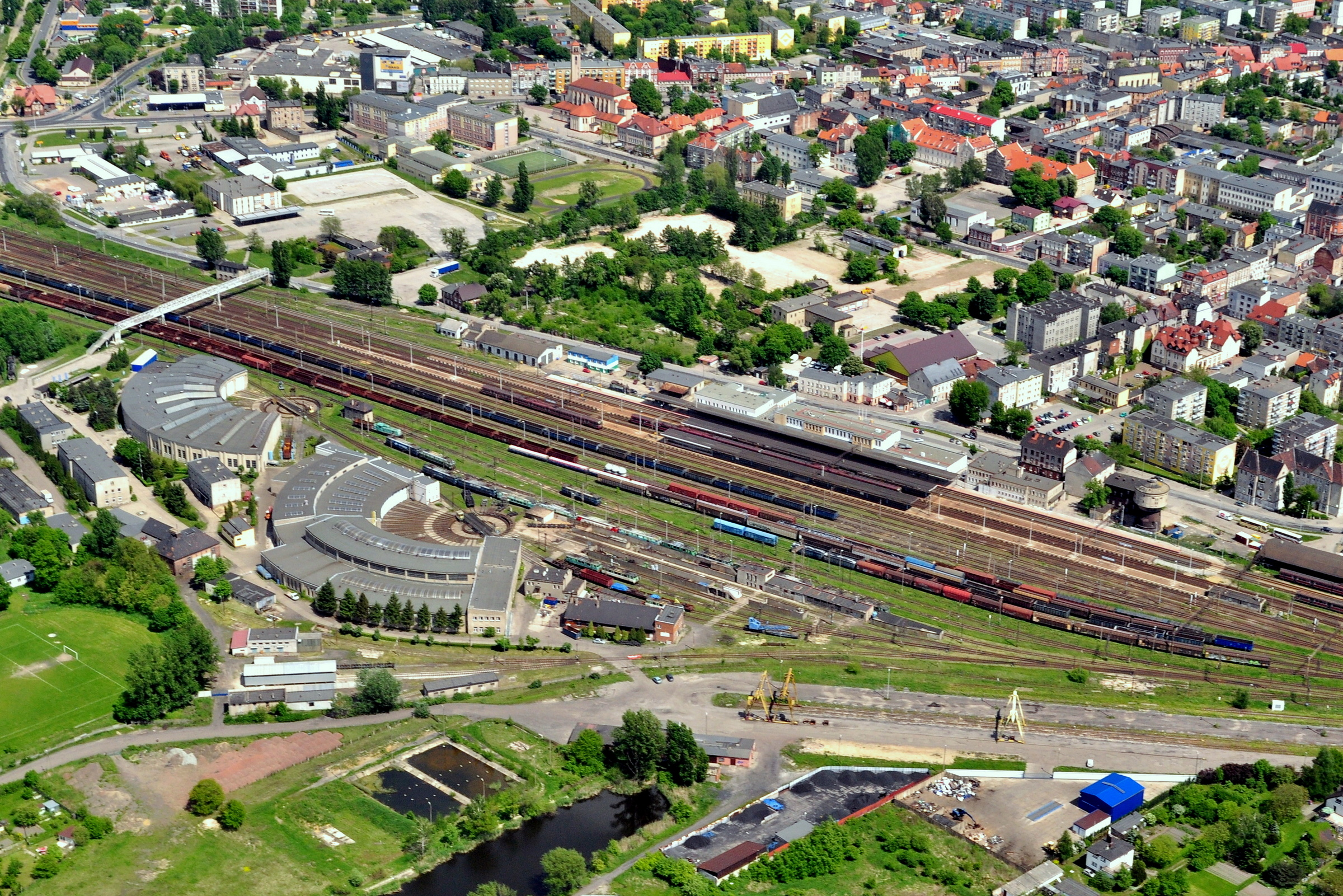 Ostrów Wlkp. Węzeł kolejowy